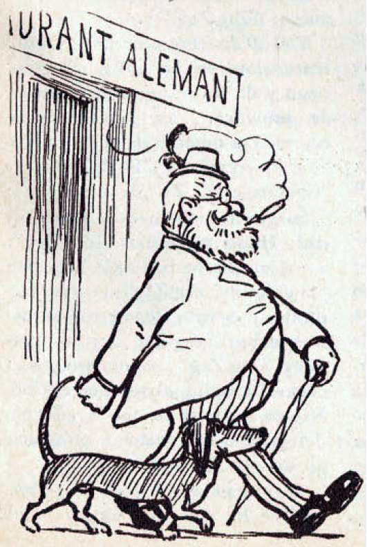 Von Pilsener y su perro, Dudelsackpfeifergeselle. Caricatura de Luztig, seudónimo de Pedro Subercaseaux.